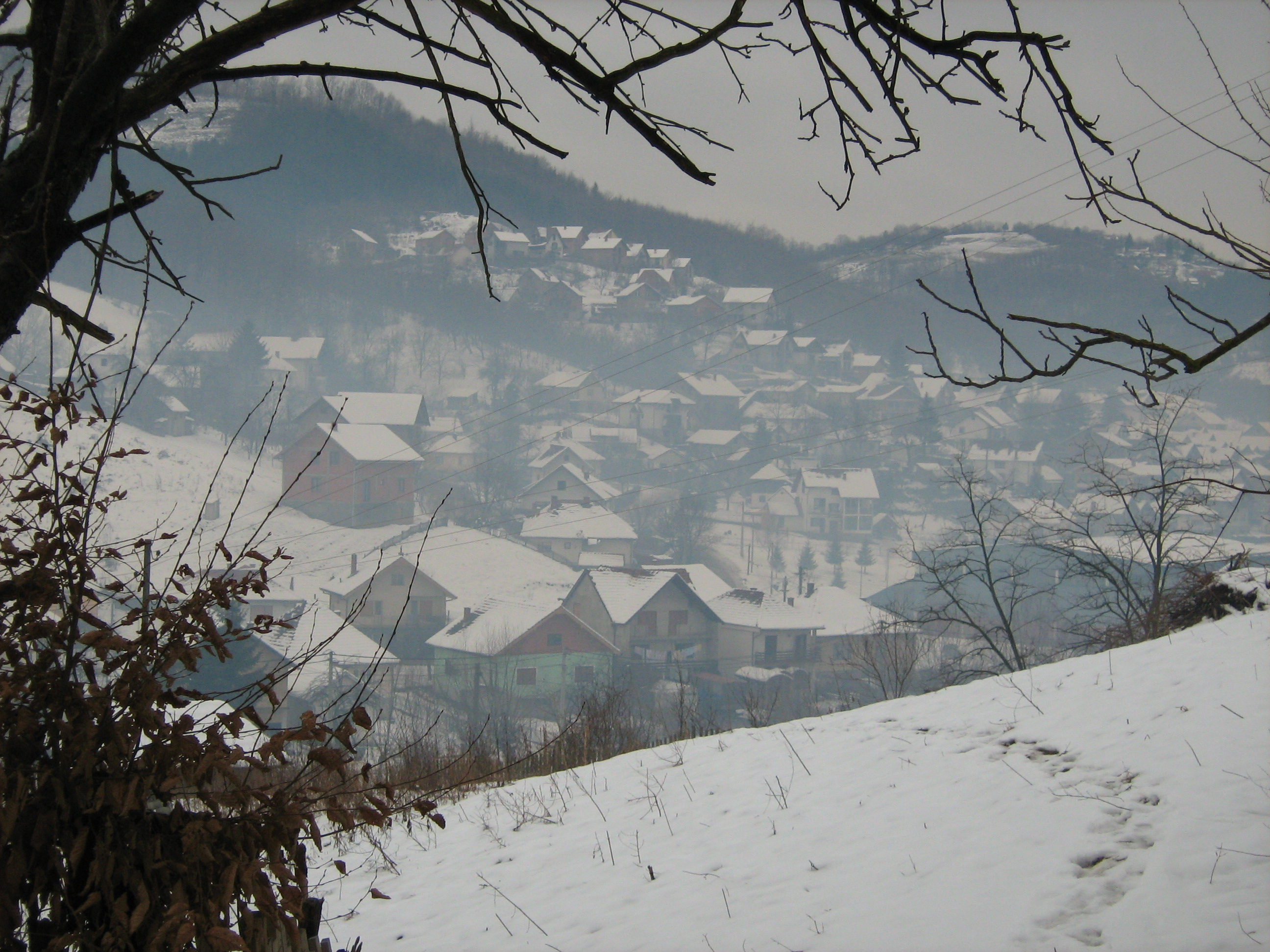 Krupanj, winter 2007/08